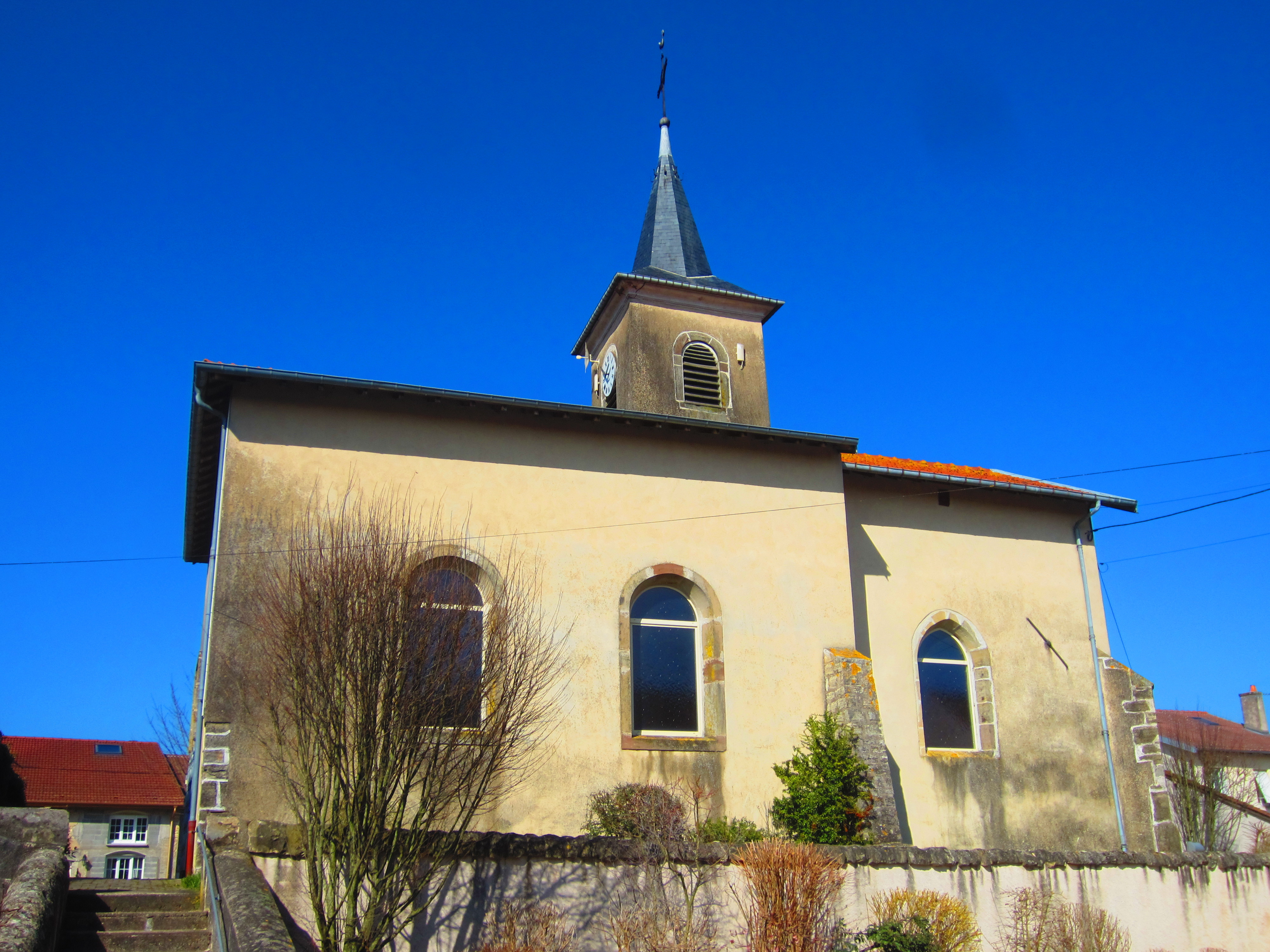 Franconville eglise